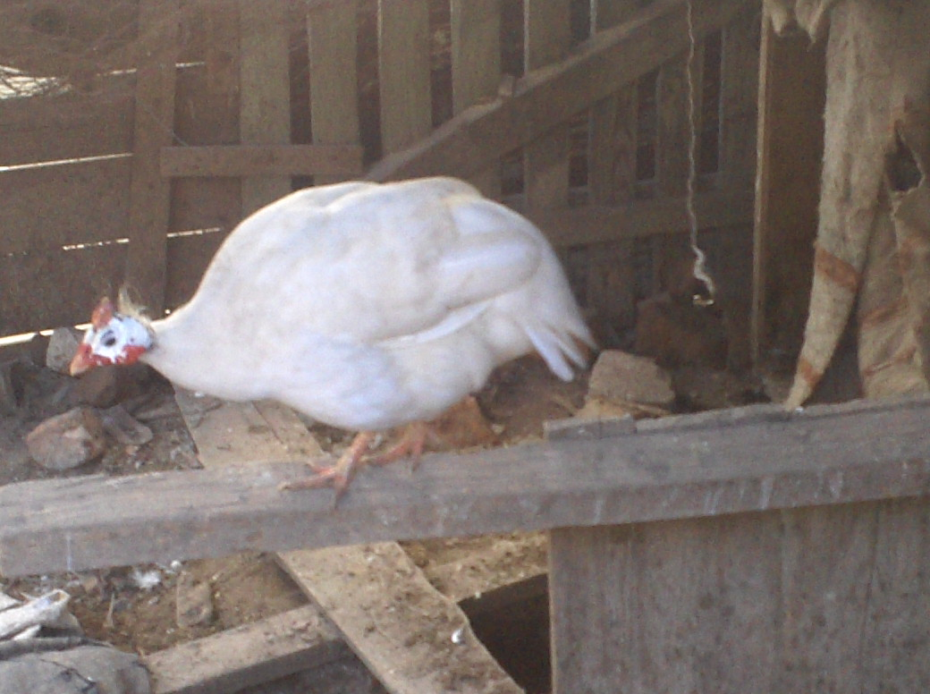 pichire albă